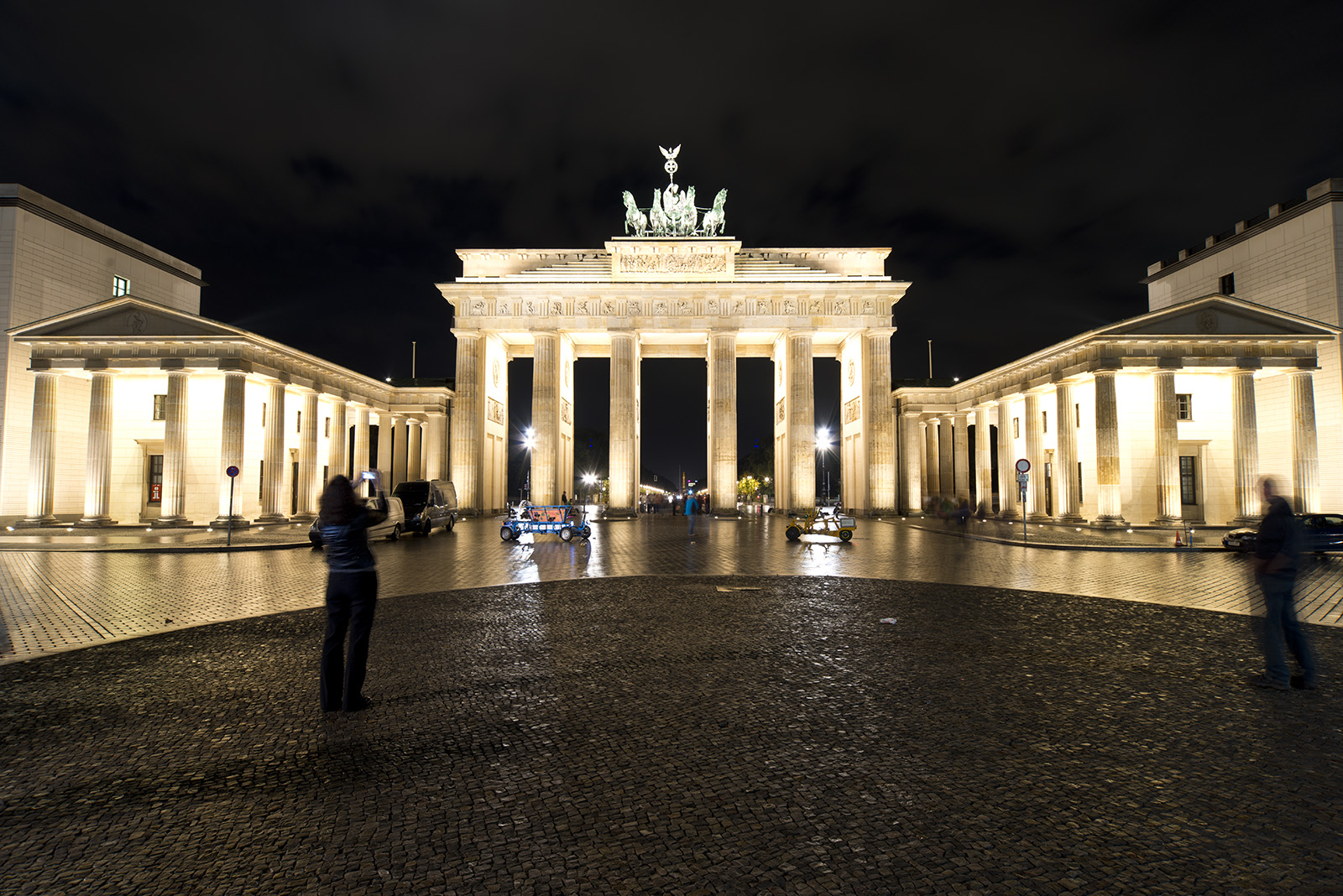 Brandenburg Gate